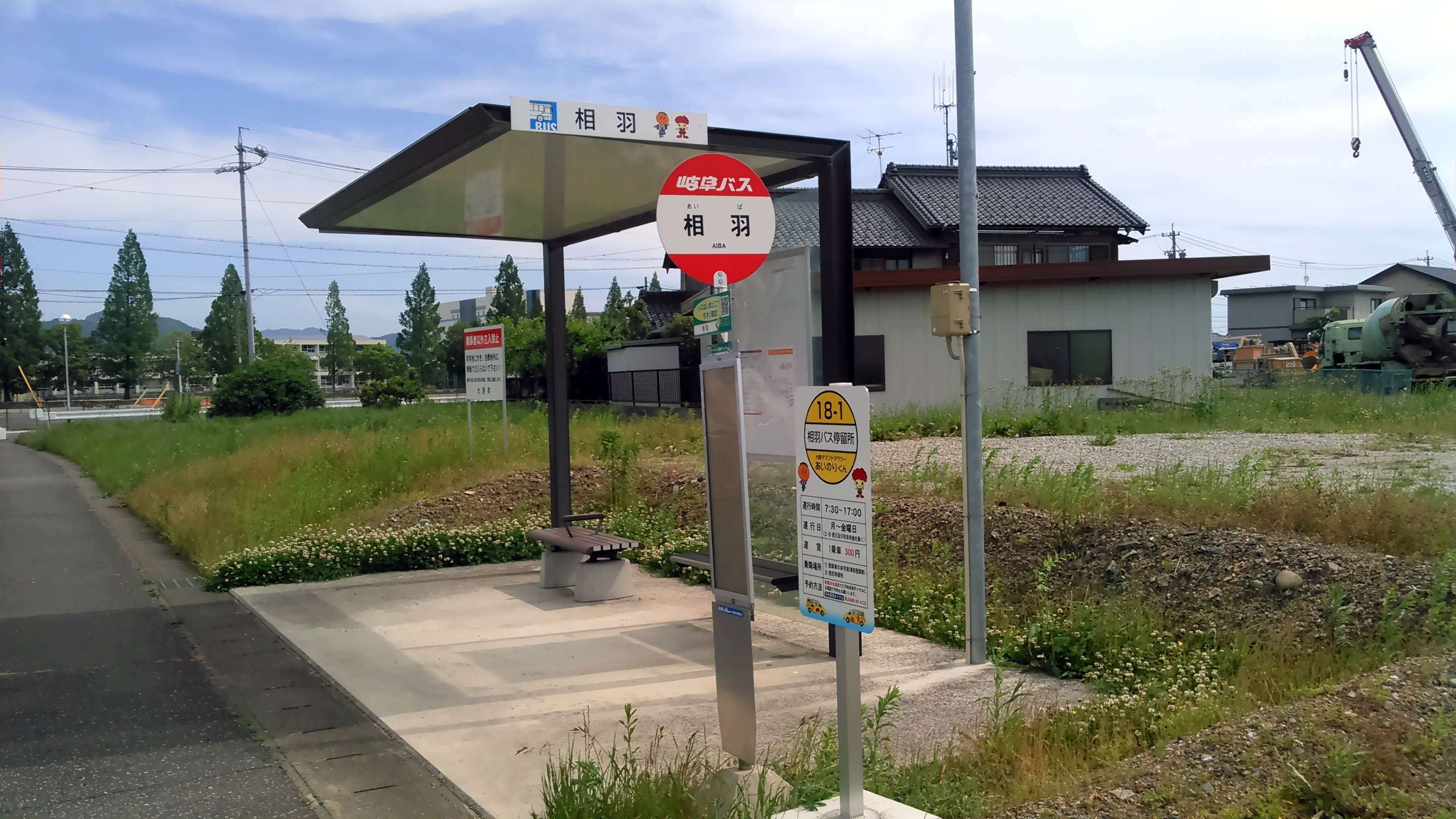 名鉄揖斐線廃線後の代替交通手段。 岐阜バス（岐阜乗合自動車）・大野デマンドタクシーの停留所となっている。 JR・名鉄岐阜駅と大野バスターミナル方面の時刻表が共存している。